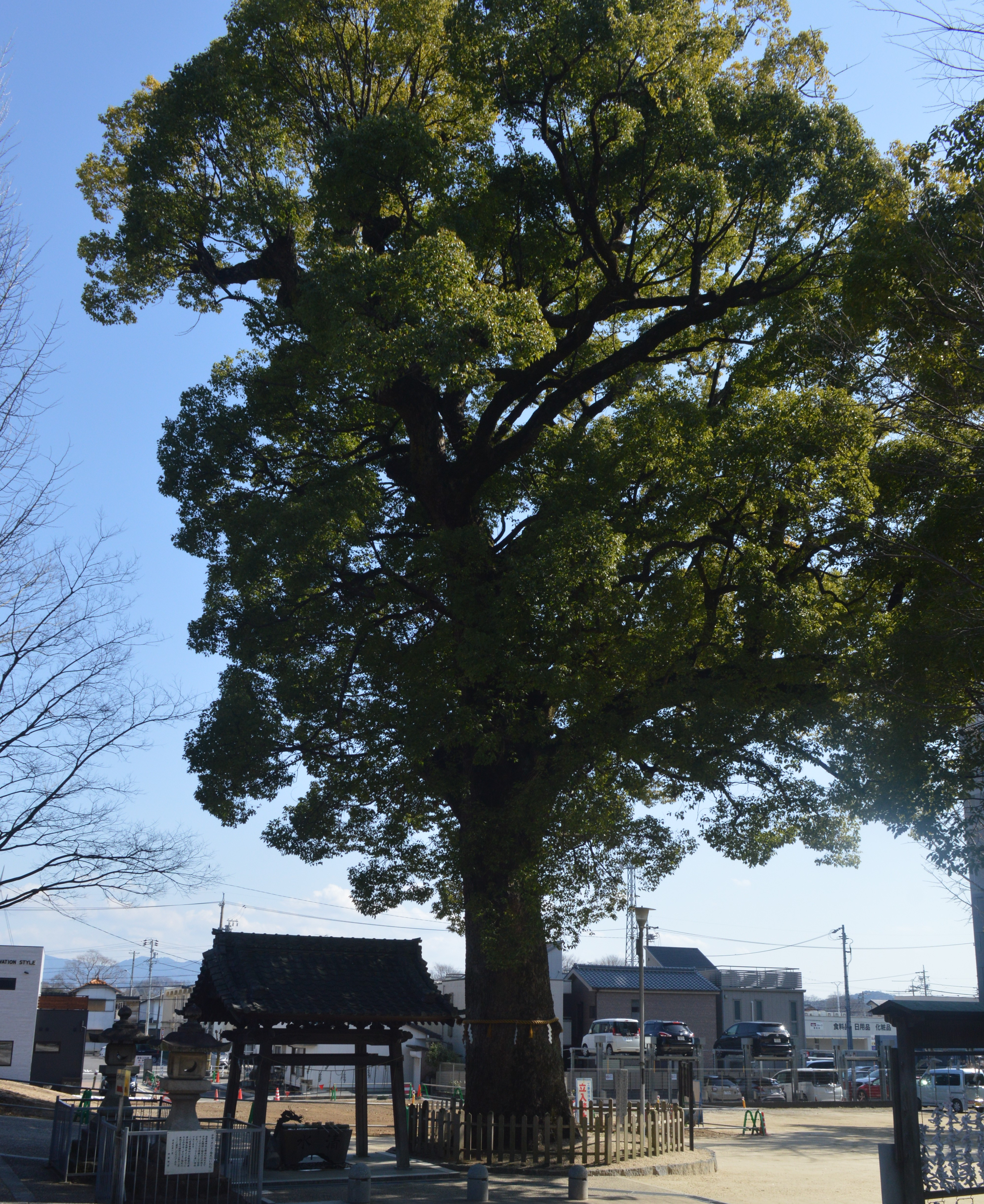 愛知県豊田市挙母町にある挙母神社。「挙母神社の樟」。豊田市指定天然記念物。